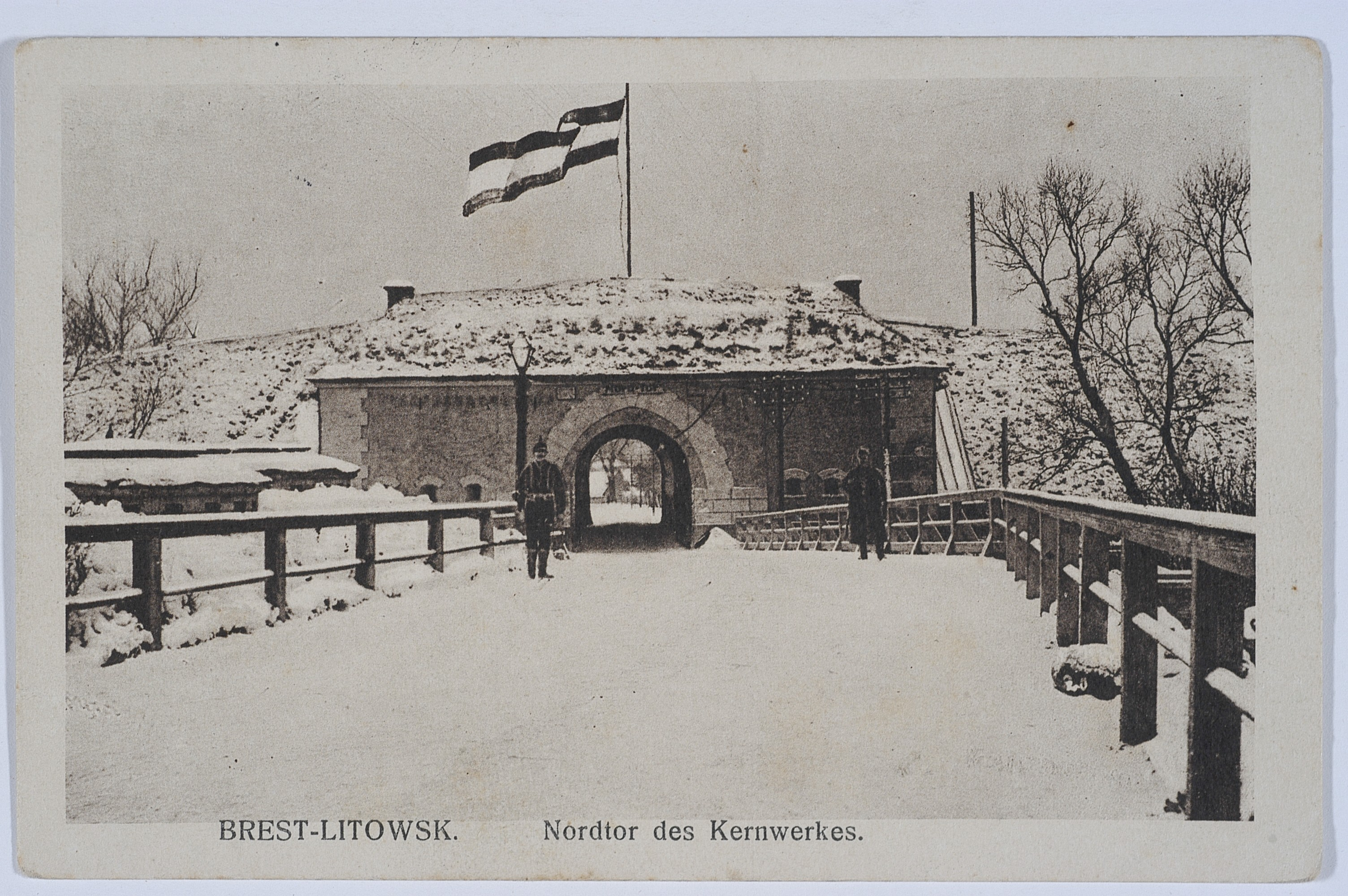 Беларуская (тарашкевіца): Берасьце (Bieraście), Паўночная брама (Paŭnočnaja brama)